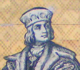 Dresdener Fürstenzug – Ernst von Sachsen